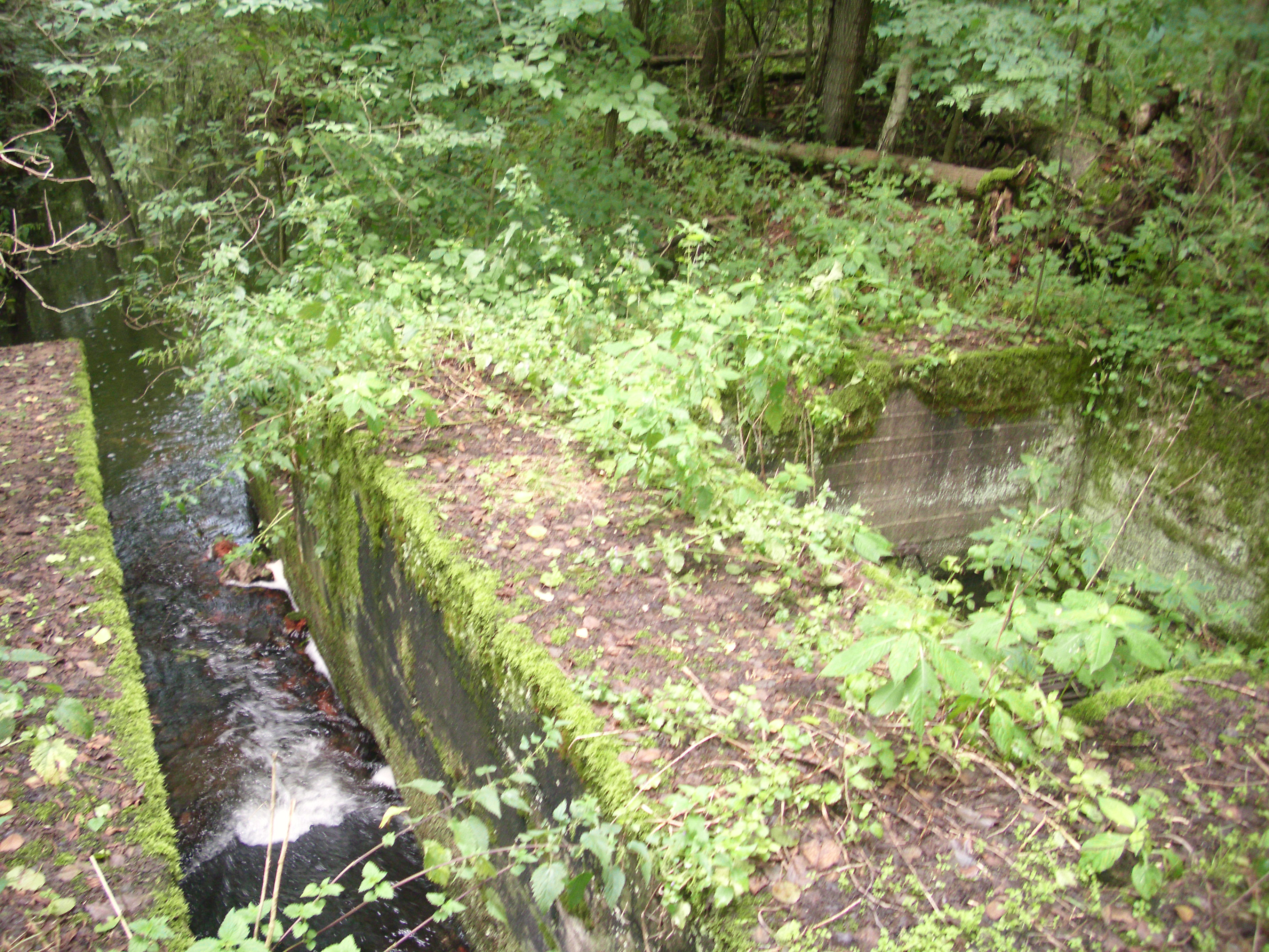 Fundamentreste der Mittelmühle im Schlaubetal, nahe Schernsdorf